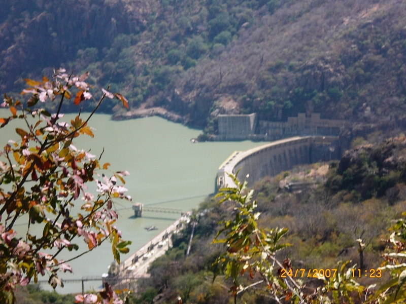 Cahora Bassa em Tete